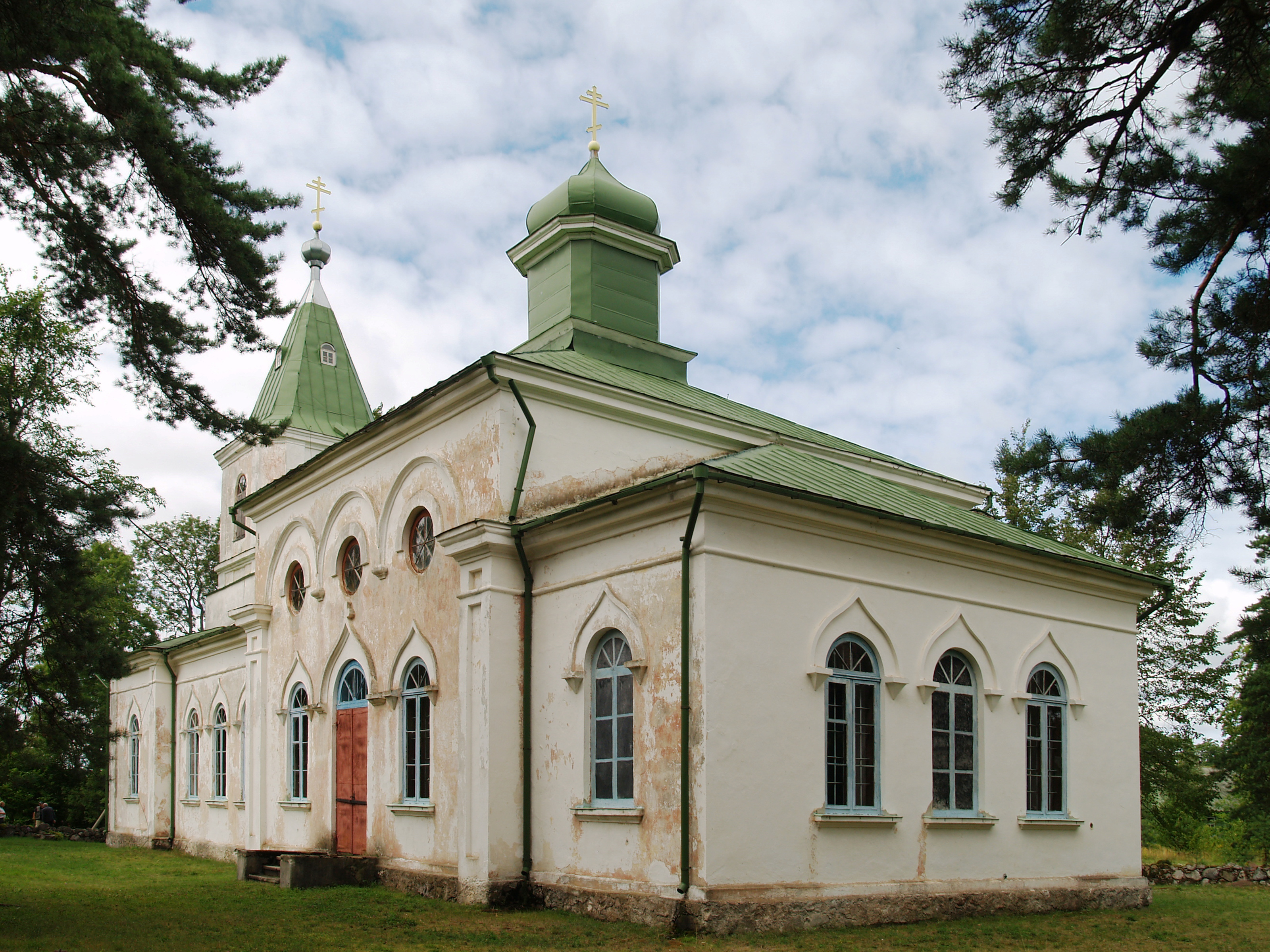 Häädemeeste õigeusu kirik